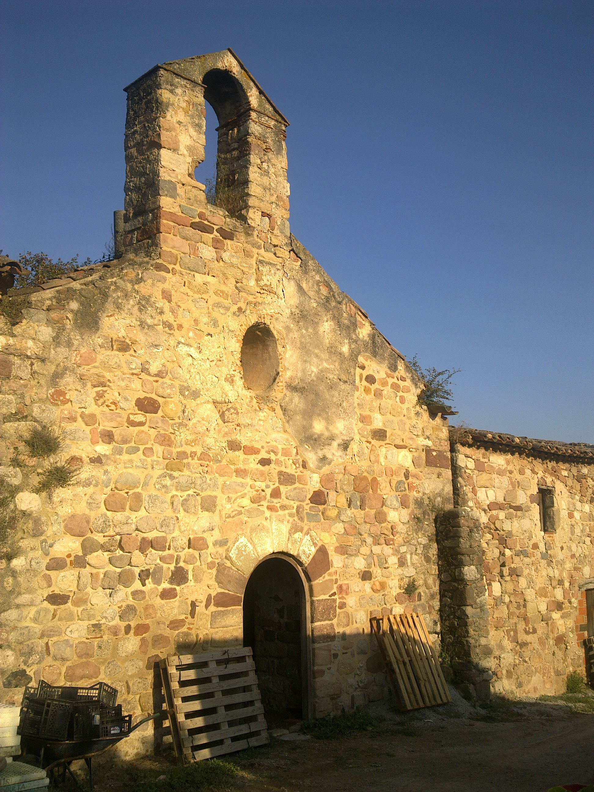 Capella de Santa Magdalena o Comanda de Palau, Romànic segle XII